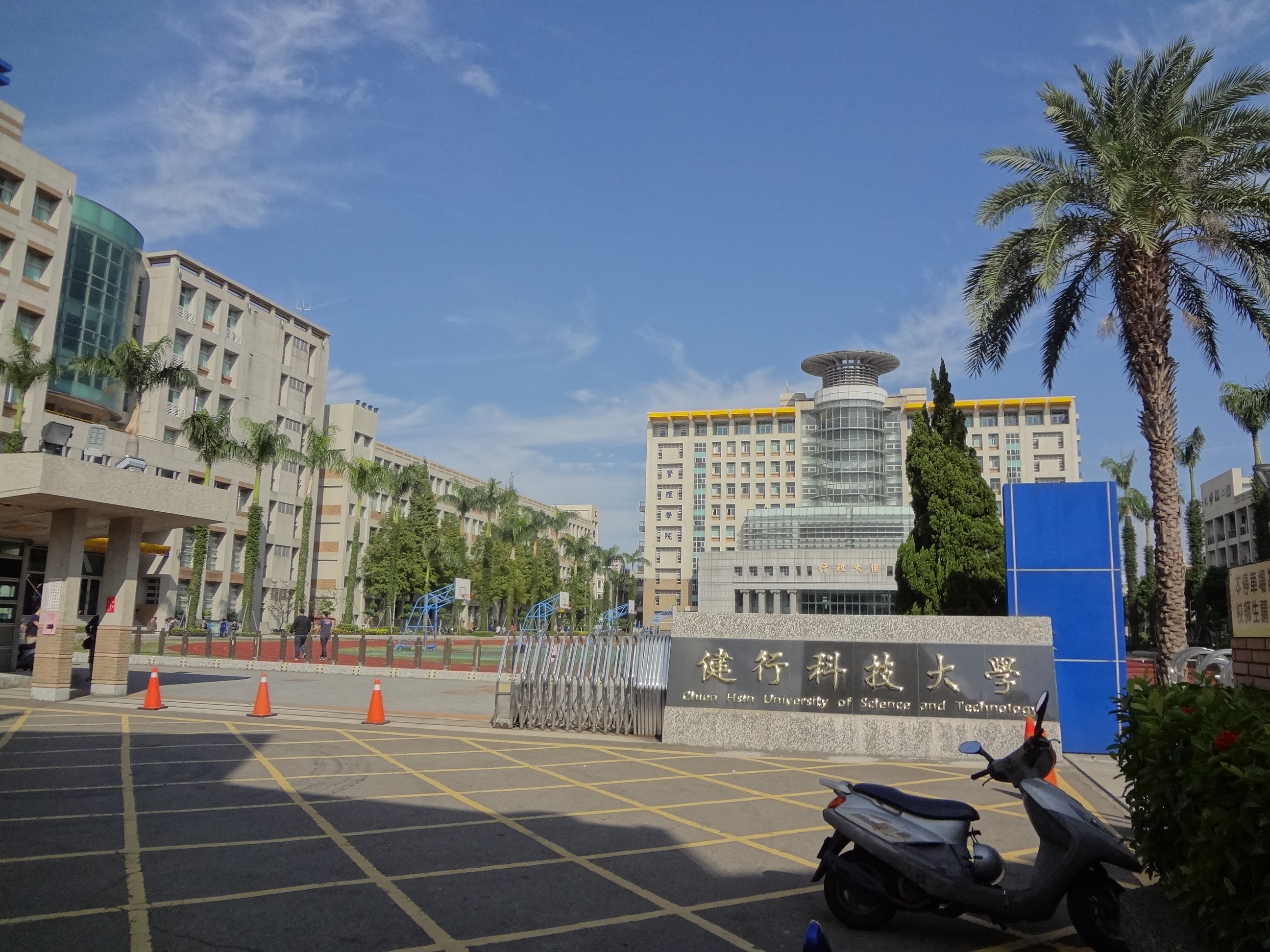 健行科技大學大門，位於臺灣桃園縣中壢市健行路229號。